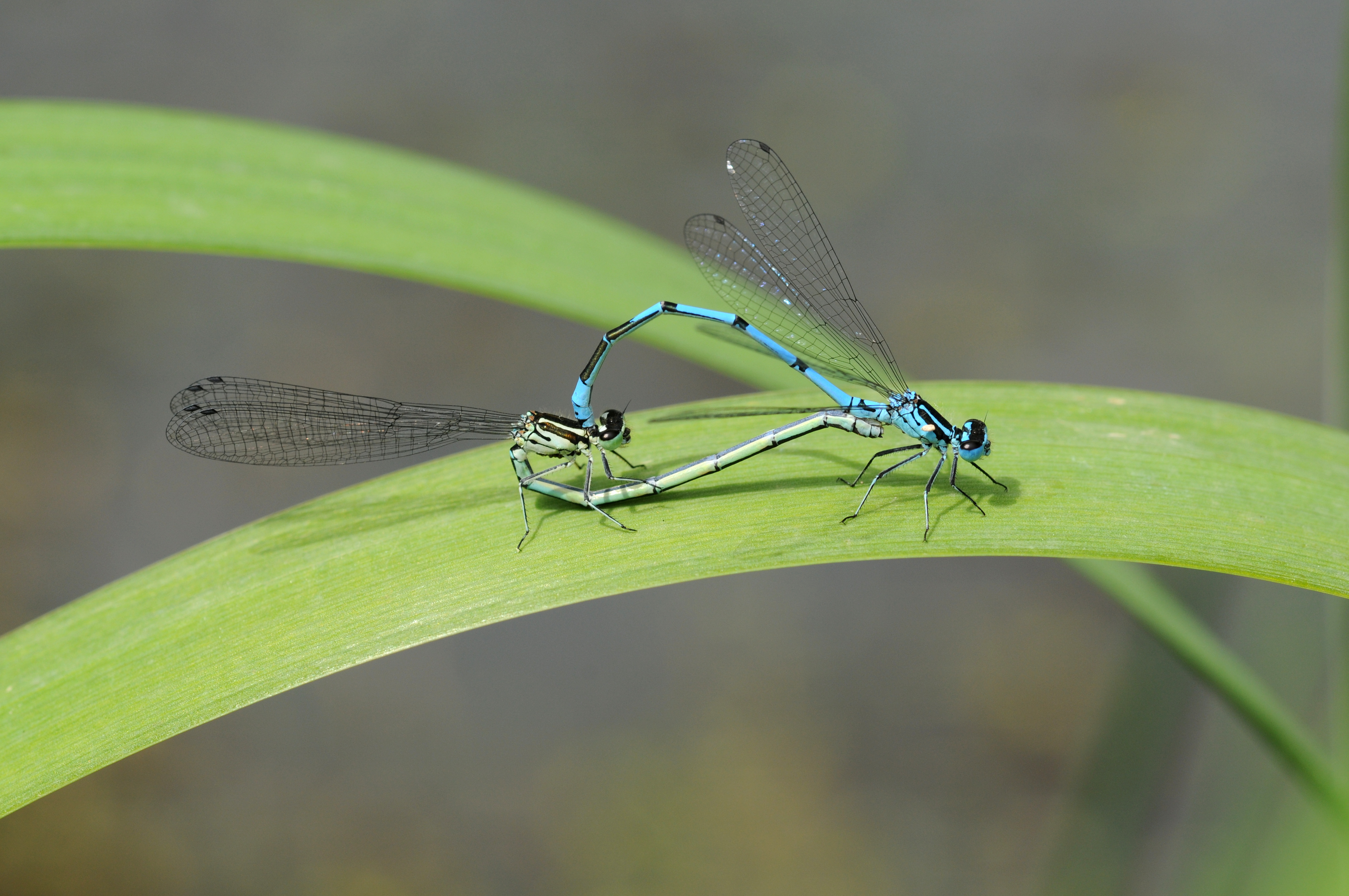 Coenagrion puella copulation.